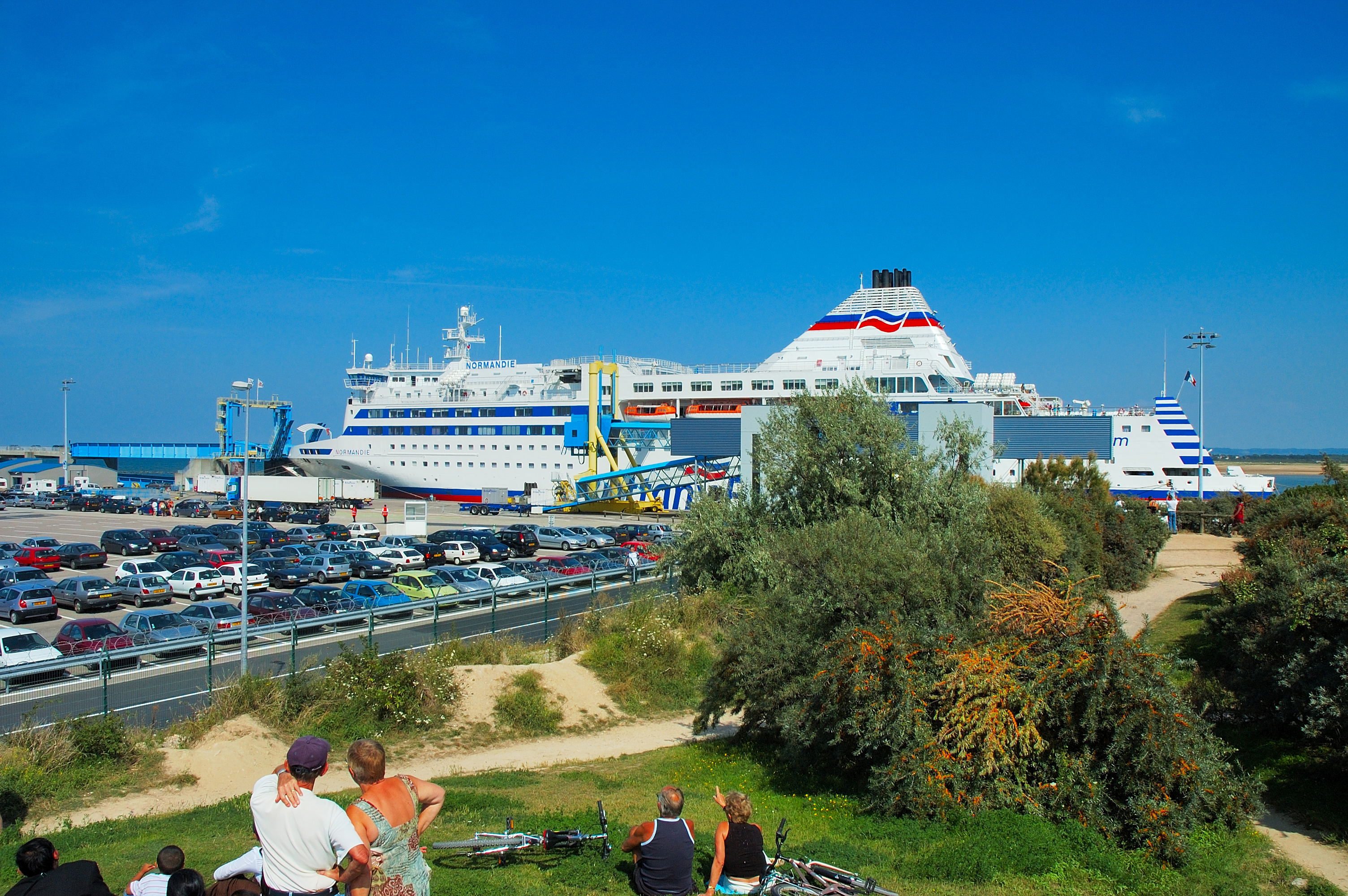 Ouistreham